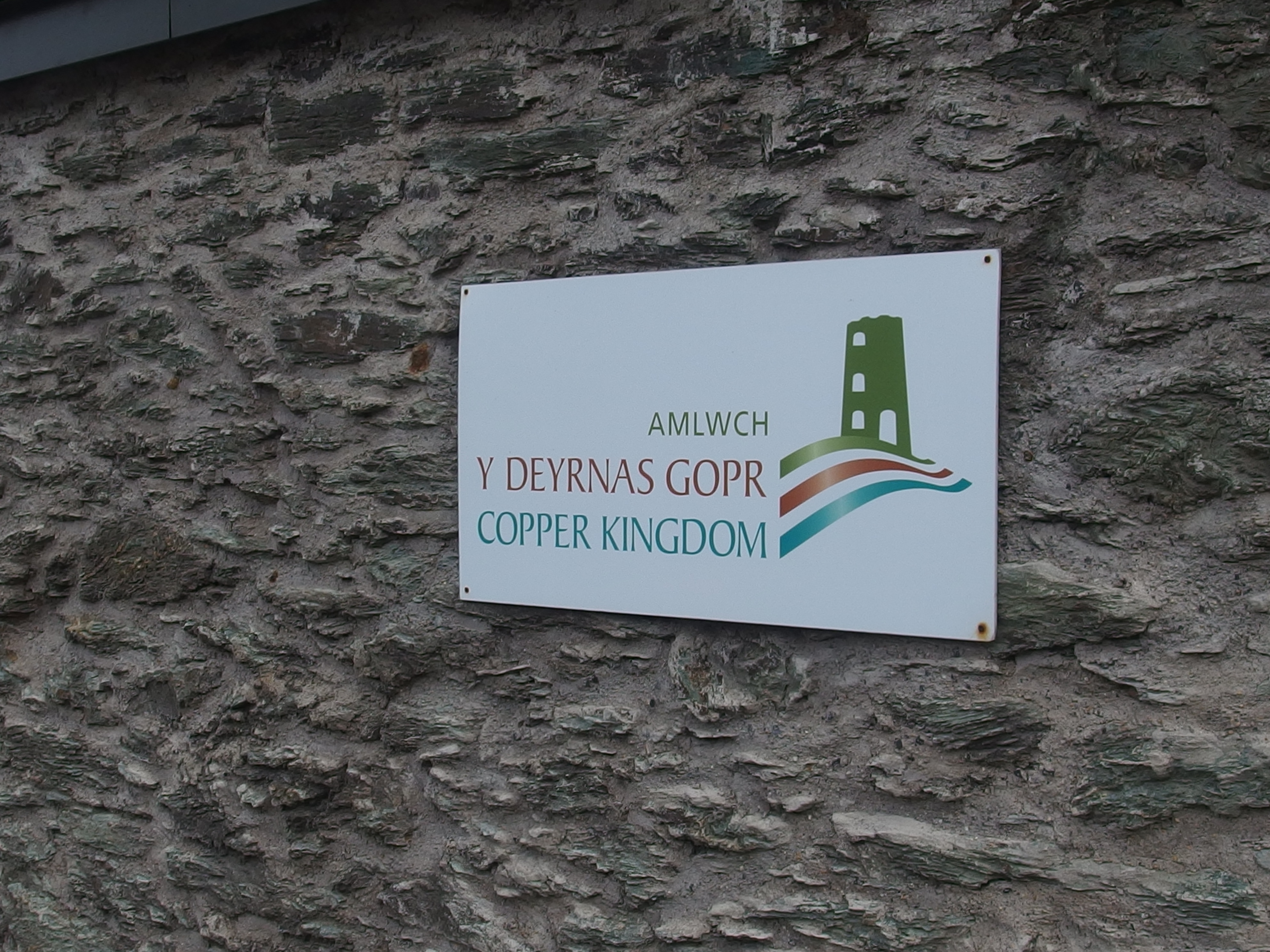 Arwydd yr amgueddfa ym Mhorth Amlwch